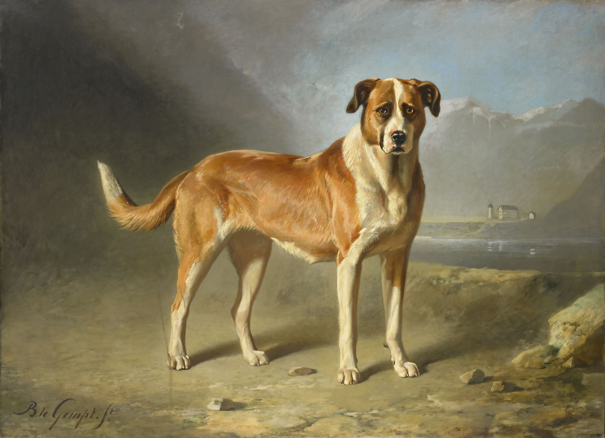 Sint Bernardshond. ca. 1850-1879. oil on canvasmedium QS:P186,Q296955;P186,Q4259259,P518,Q861259. Height: 179 cm (70.4 ″); Width: 248 cm (97.6 ″) dimensions QS:P2048,179U174728;P2049,248U174728. Amsterdam, Rijksmuseum Amsterdam.